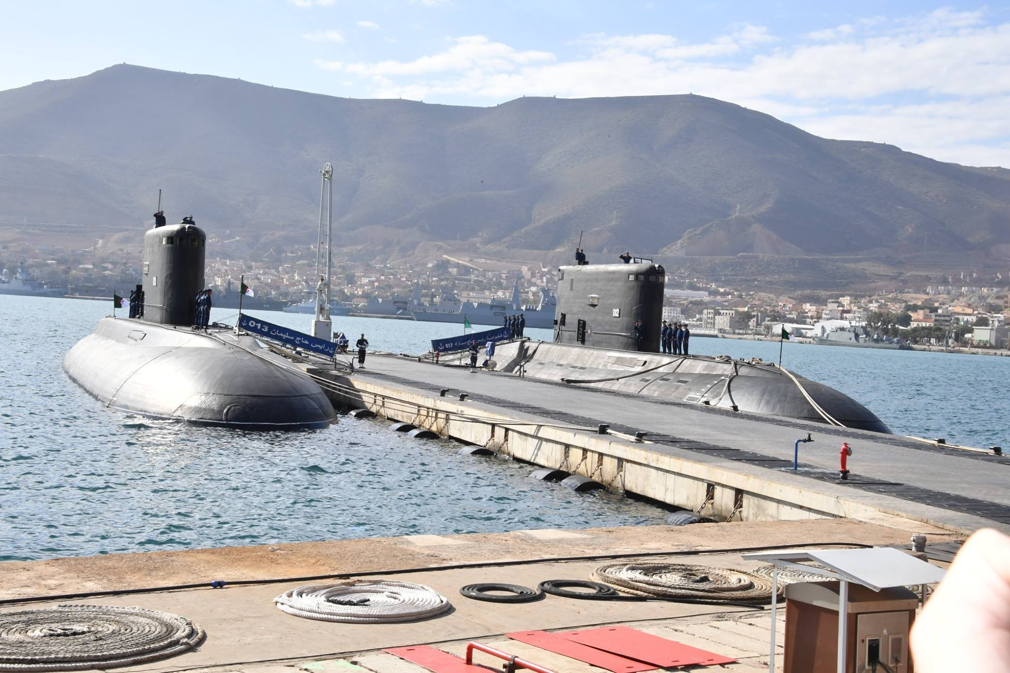 Sous-marins de classe Kilo de la Marine algérienne à Mers el-Kébir (Oran). El Hadj Slimane (013), Rais Hadj Mubarek (012).